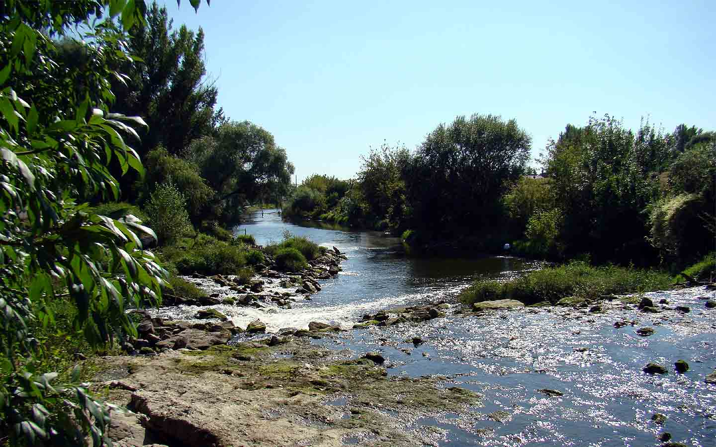 Vodné kaskády Zúgov v Nových Zámkoch.